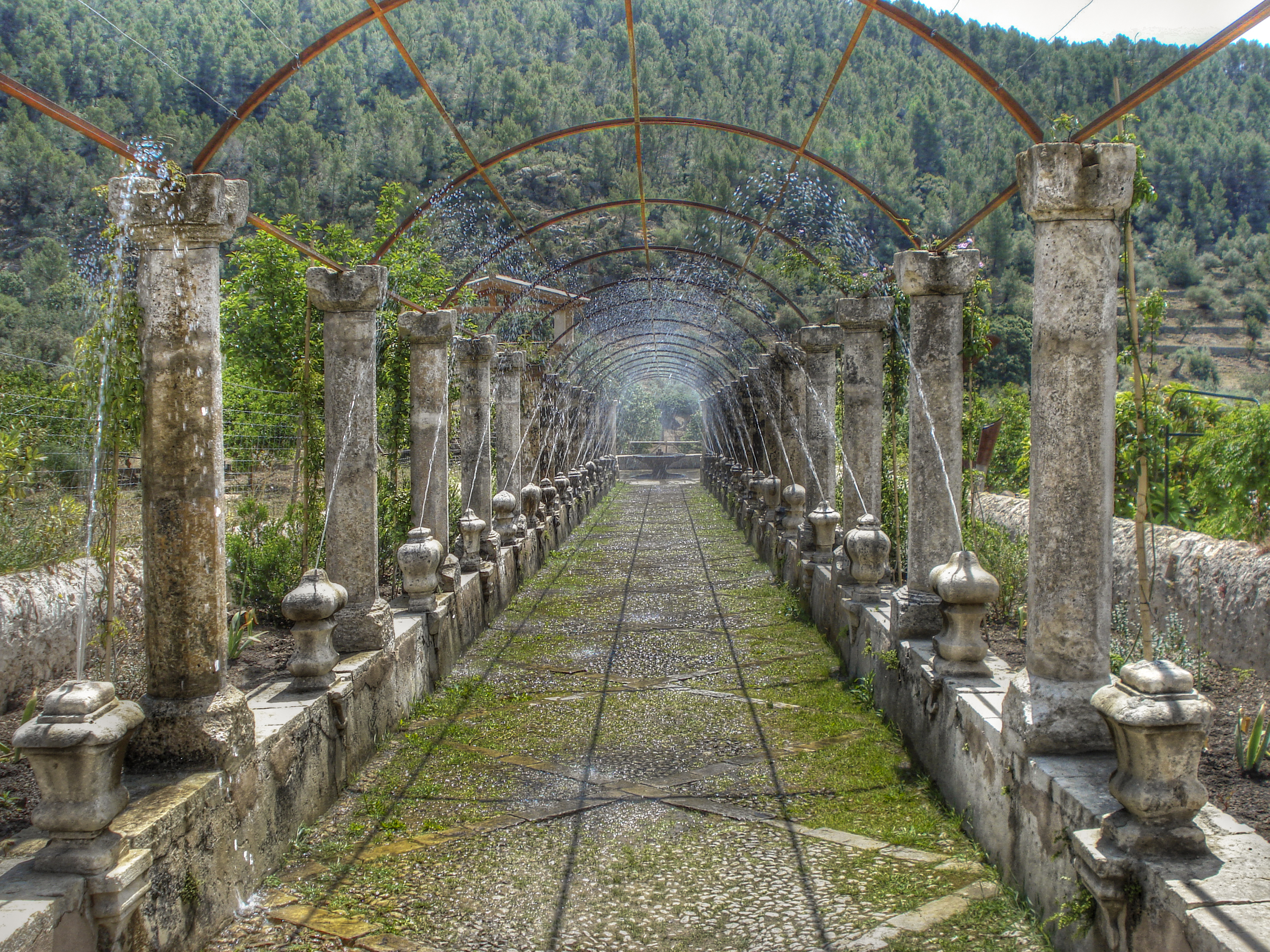 Gärten von Alfabia, Mallorca: Säulengang